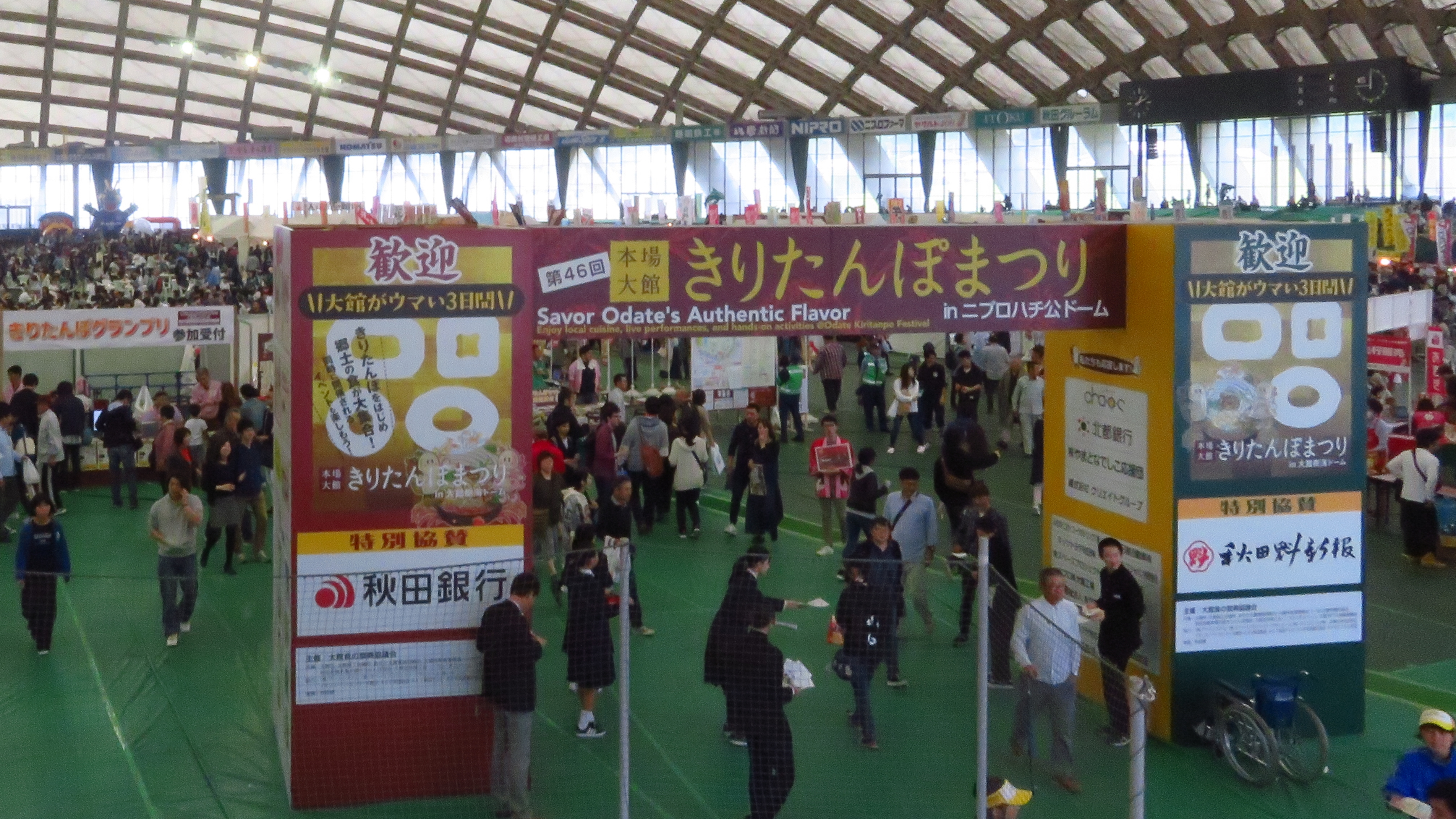 第46回 本場大館きりたんぽまつり2018：秋田県大館市 ニプロハチ公ドーム Canon PowerShot SX720 HS